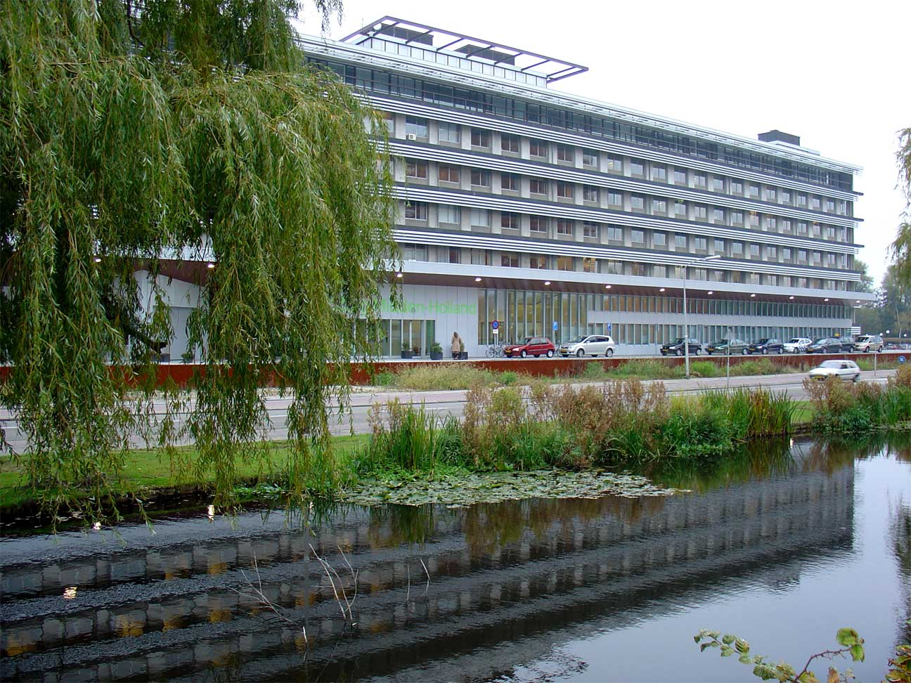 Groene Hart Ziekenhuis te Gouda